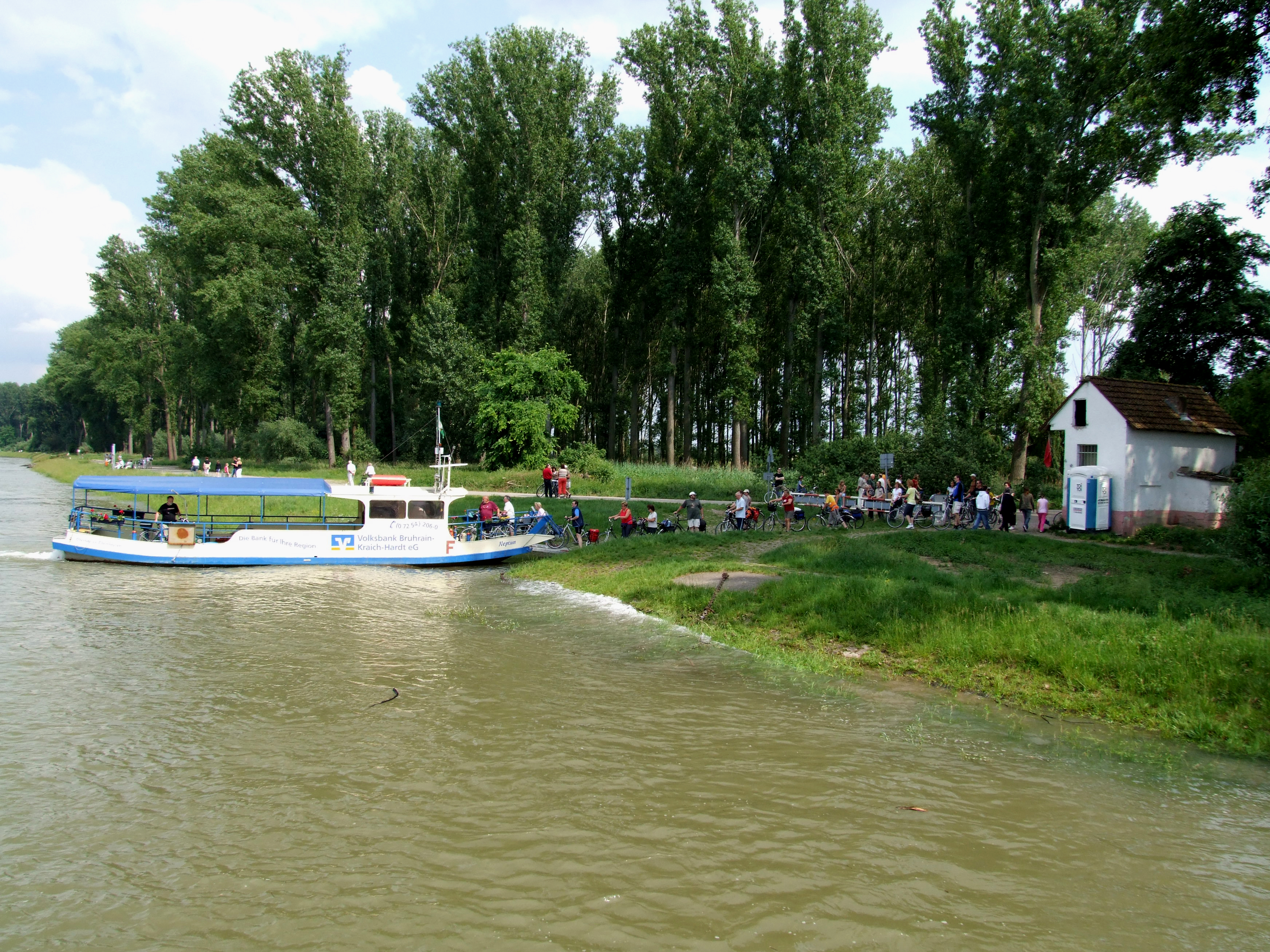 Aufnahme von Passagieren; die Neptun Fähre für Fahrräder und Personen zwischen Speyer und Rheinhausen